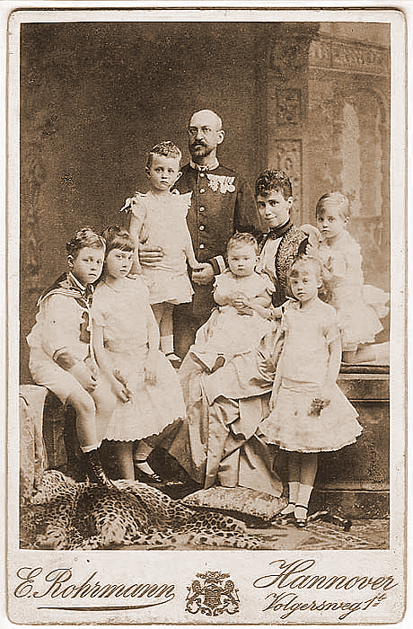 Princess Thyra of Denmark and Ernest Augustus, Crown Prince of Hanover with their six children, 1887/88. On Thyra's lap: Baby Ernest Augustus, Duke of Brunswick Links: Georg Wilhelm (1880–1912). Neben seinem Vater Ernst August von Hannover (1845–1923) stehend, Prinz Christian von Hannover (1885-1901). Auf dem Schoß der Mutter Thyra von Dänemark (1853–1933), der jüngste Sohn Ernst August (1887–1953)